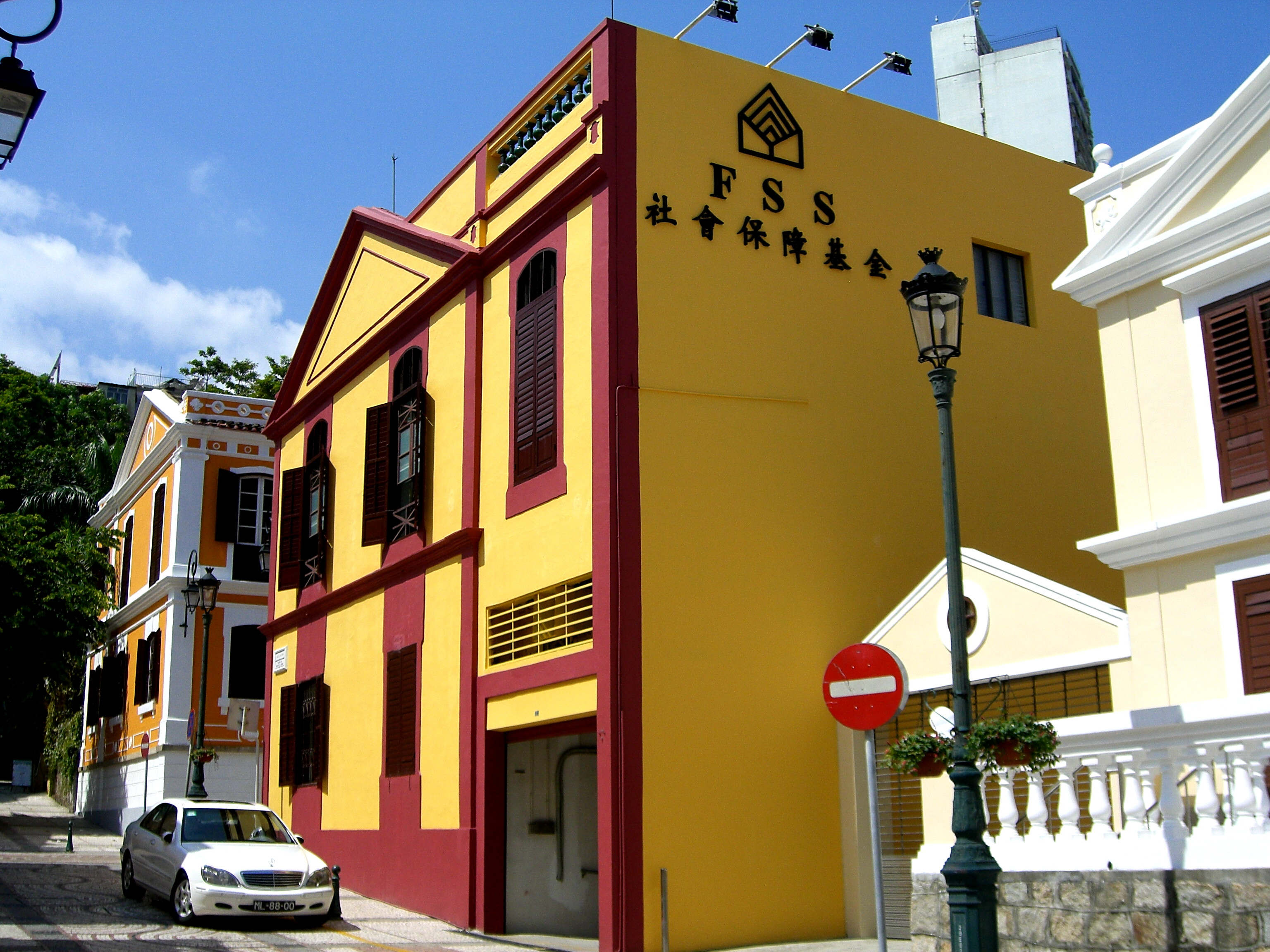 Fundo de Segurança Social